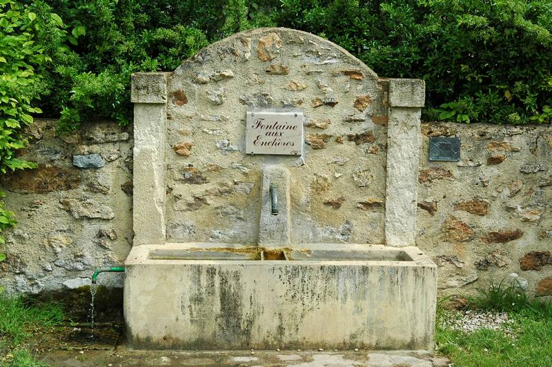 La fontaine aux enchères de Saint Eugène (sud de l'Aisne).